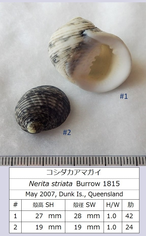 オーストラリアのダンク島でひろったコシダカアマガイ